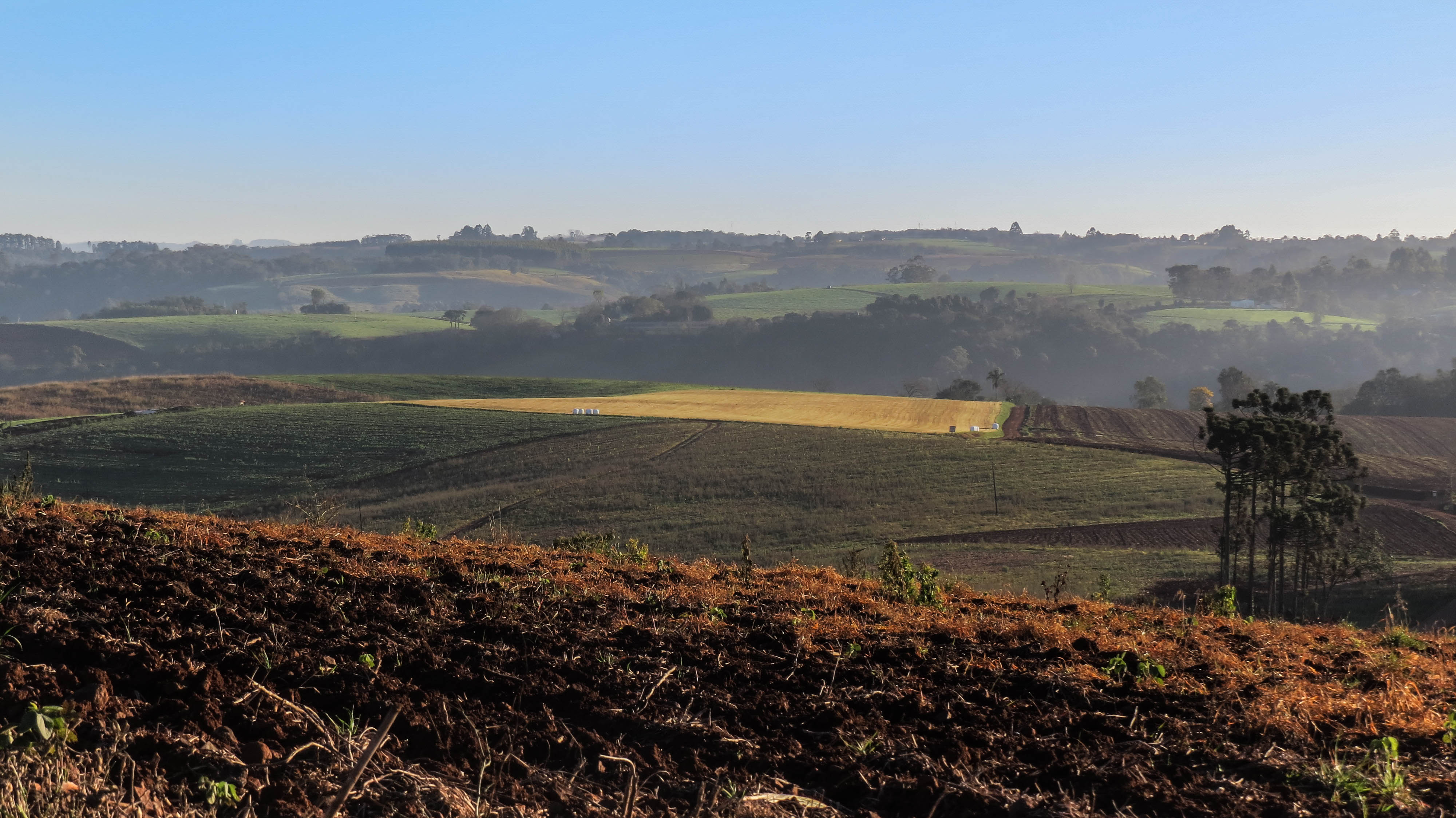 Área rural de Iporã do Oeste